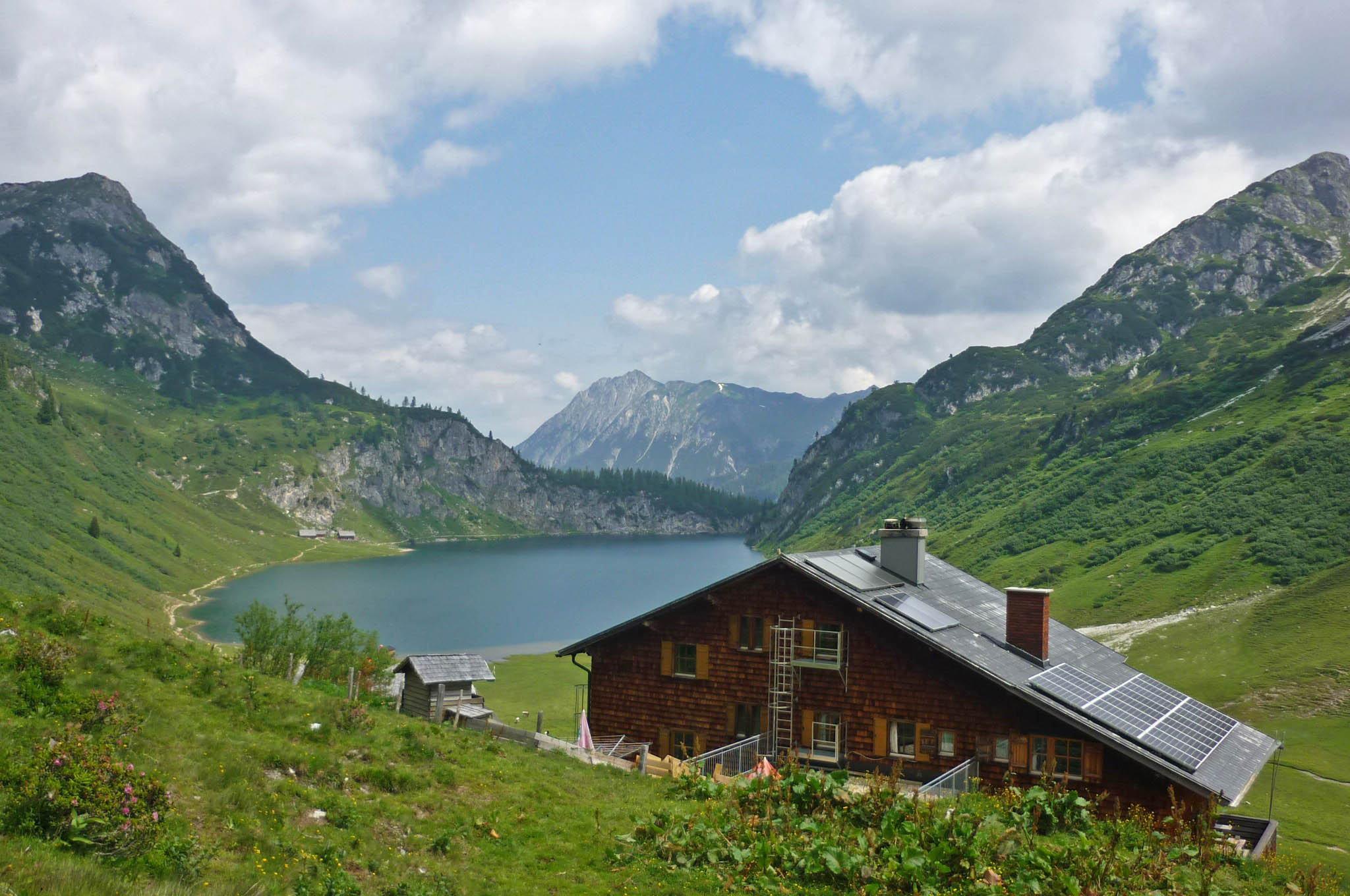 Tappenkarseehütte im Großarltal